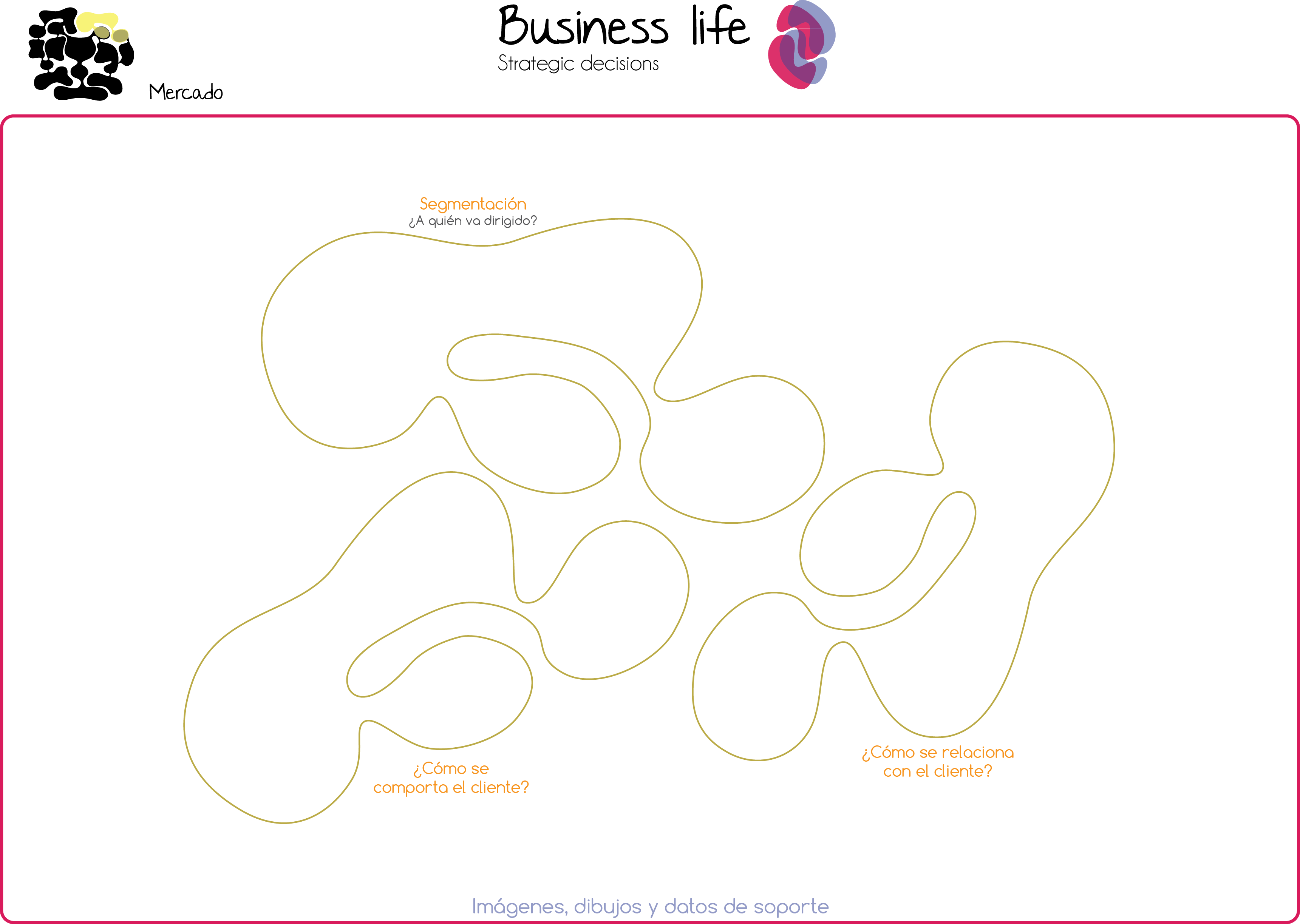 Herramienta para realizar planeación de mercados en el modelo de negocio. Aspectos de mercado en estrategias de negocio. (Business life model) (Modelo de negocio Business life)